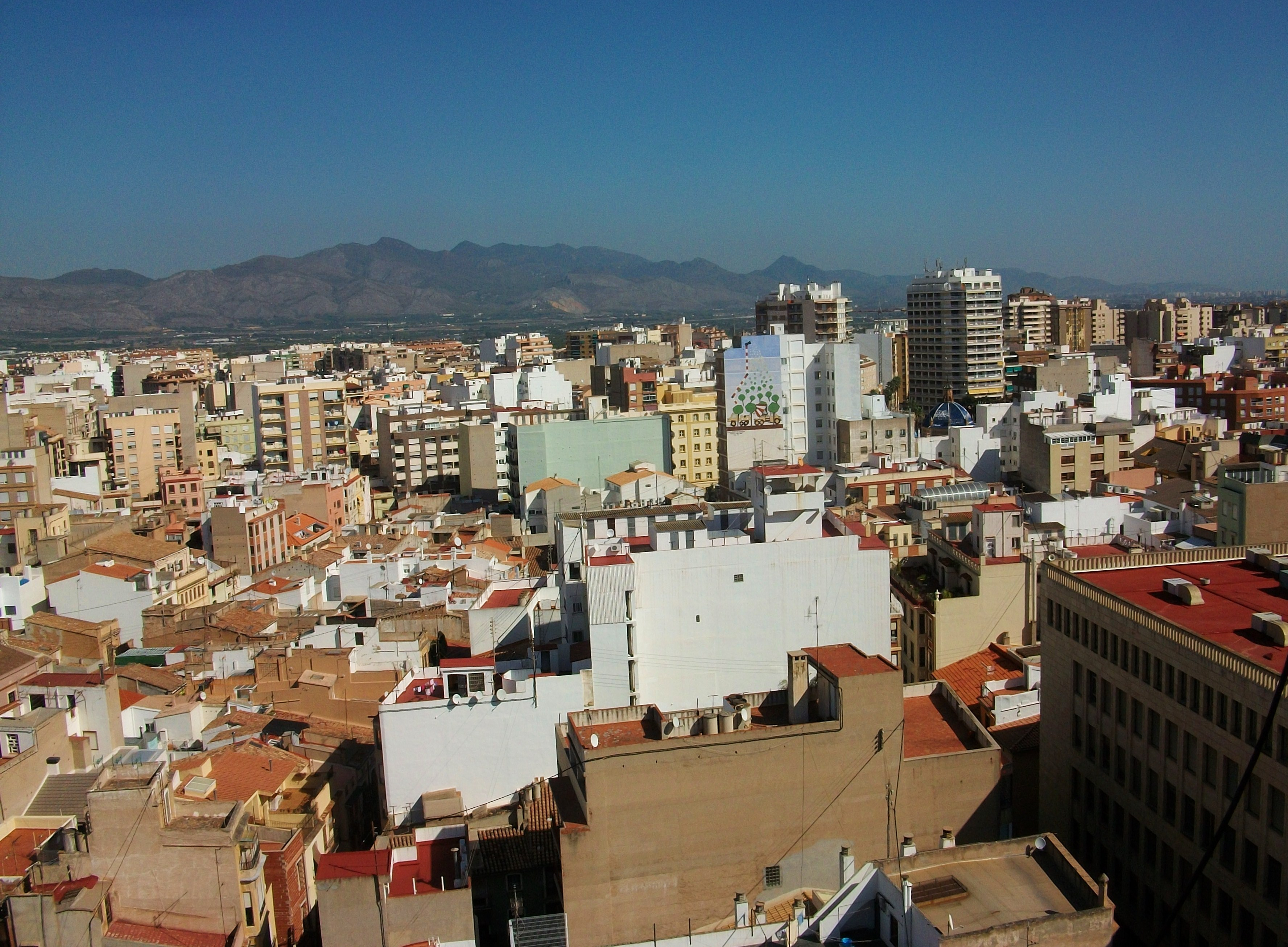 Castelló de la Plana des del Fadrí.